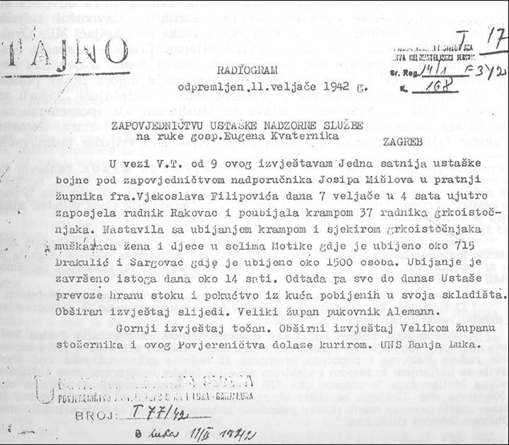 Srpskohrvatski / српскохрватски: Poverljivi izveštaj pukovnika Alemanna zapovedniku Ustaške nadzorne službe Eugenu Kvaterniku o masovnim ubistvima srpskih rudara krampom od 11. veljače 1942. godine